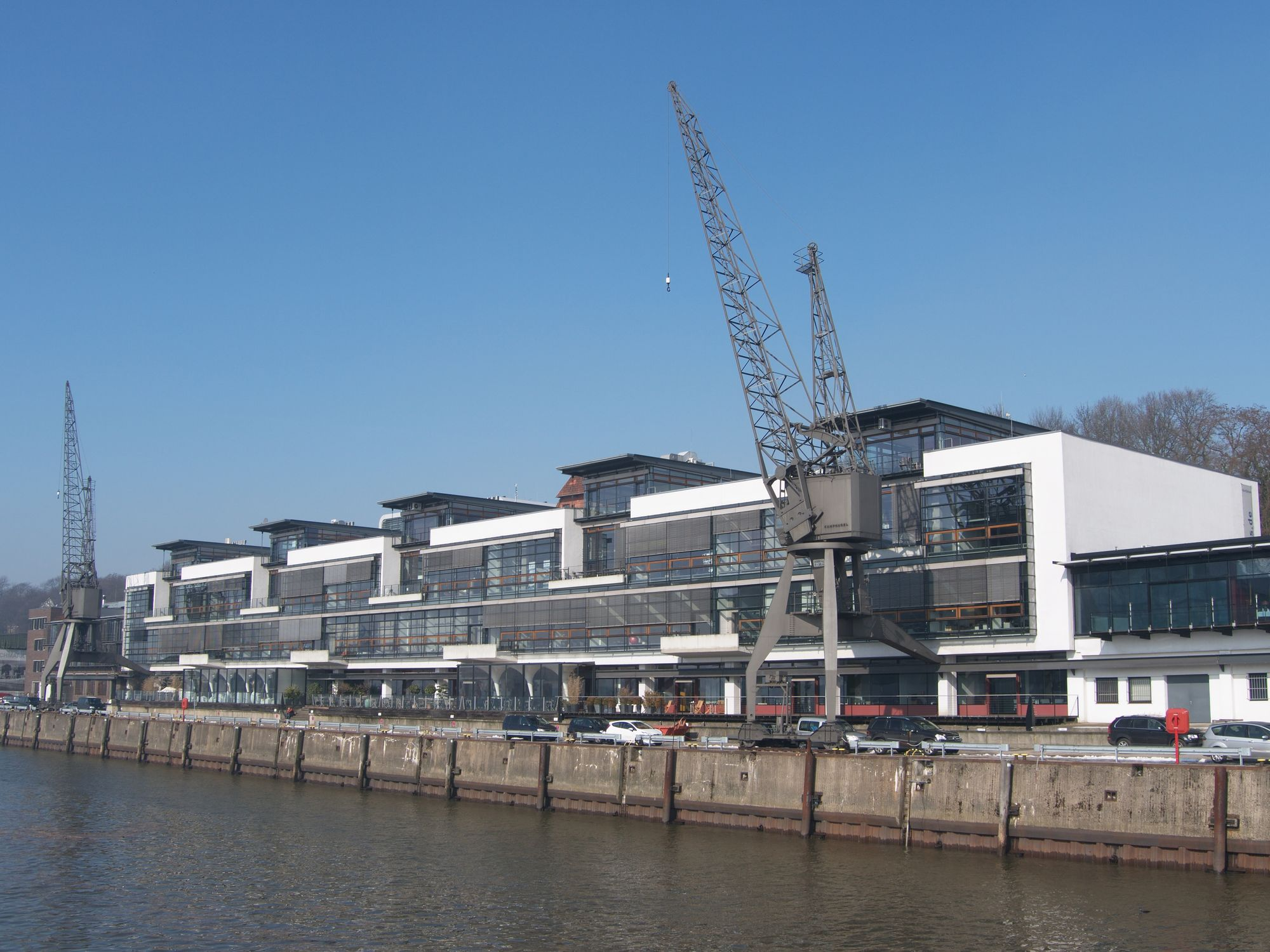 Elbkaihaus, Hamburg, Große Elbstraße 143-145 Architekt: Gerkan, Marg und Partner